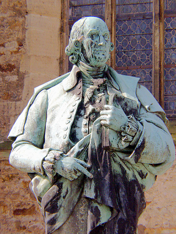 Herder-Denkmal an der Bückeburger Stadtkirche, errichtet 1908 ([1]) in Erinnerung an Herders Wirken als Oberkonsistorialrat in Bückeburg 1771-1776